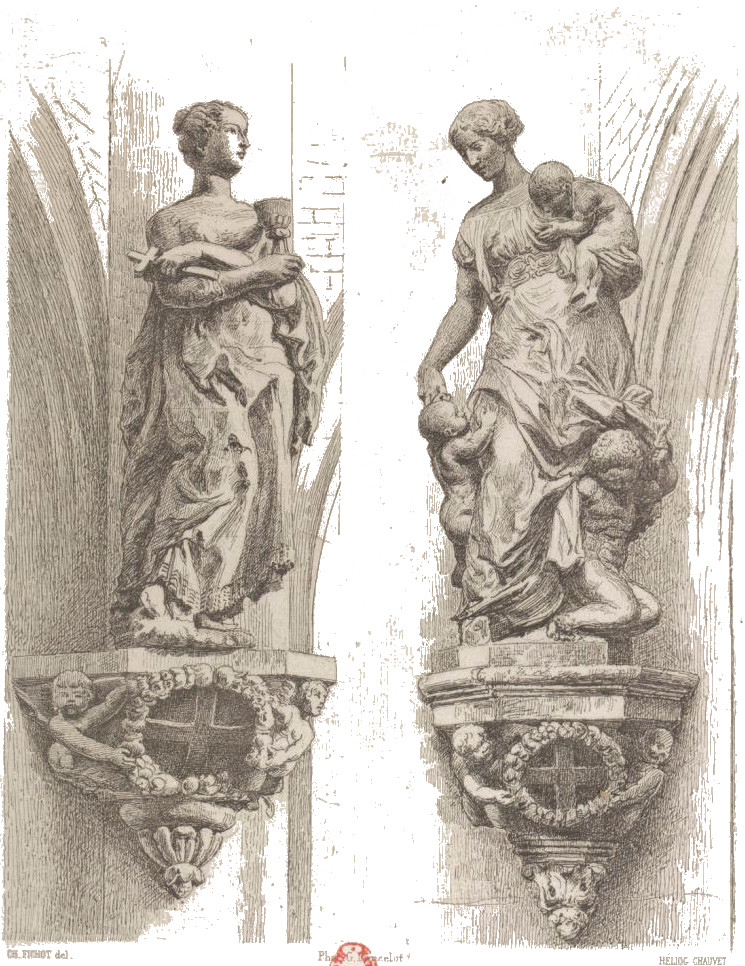 Statues provenant du jubé de l'ancienne collégiale de Saint-Étienne, par un dessin de Fichot.